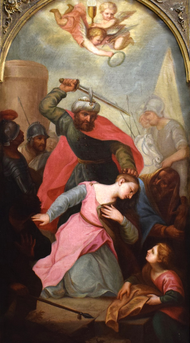 Stětí sv. Barbory 18.stol